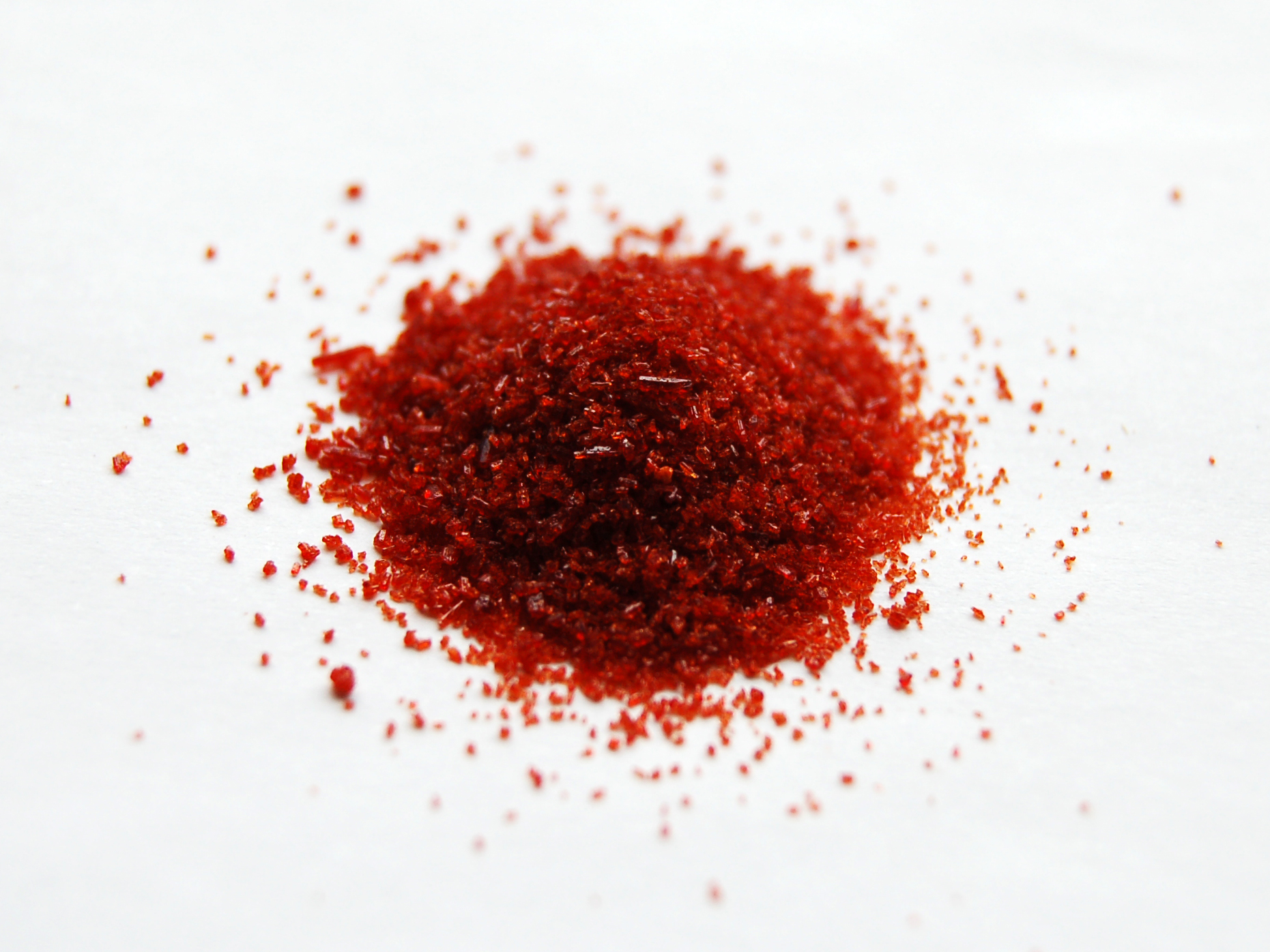 Sodium nitroprusside